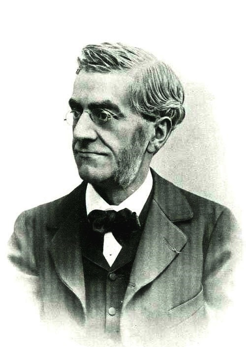 "François-Adrien Volland, maire de Nancy, 1879-1888".